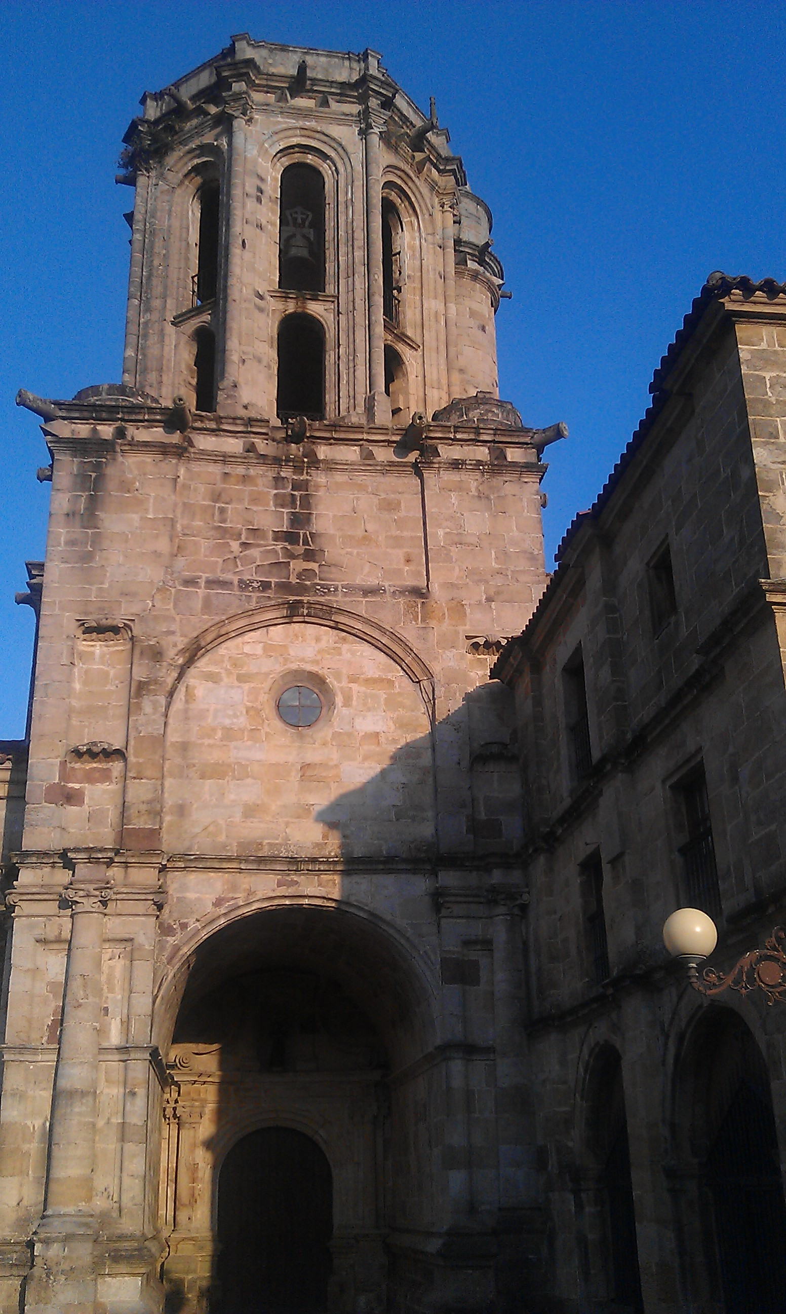 Monasterio de Nuestra Señora de El Soto, en El Soto, valle de Toranzo, en Cantabria, España, de arquitectura románica.